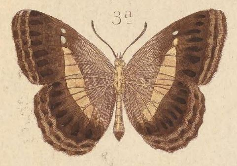 Algia felderi (underside) Kirsch, 1877